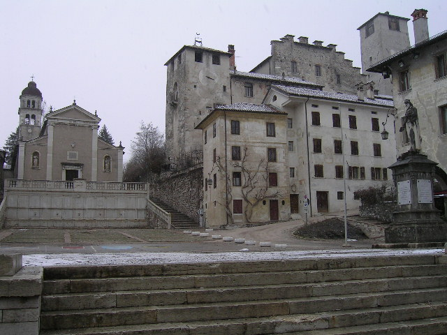 Feltre: la chiesa intitolata a San Rocco e il Castello di Alboino.